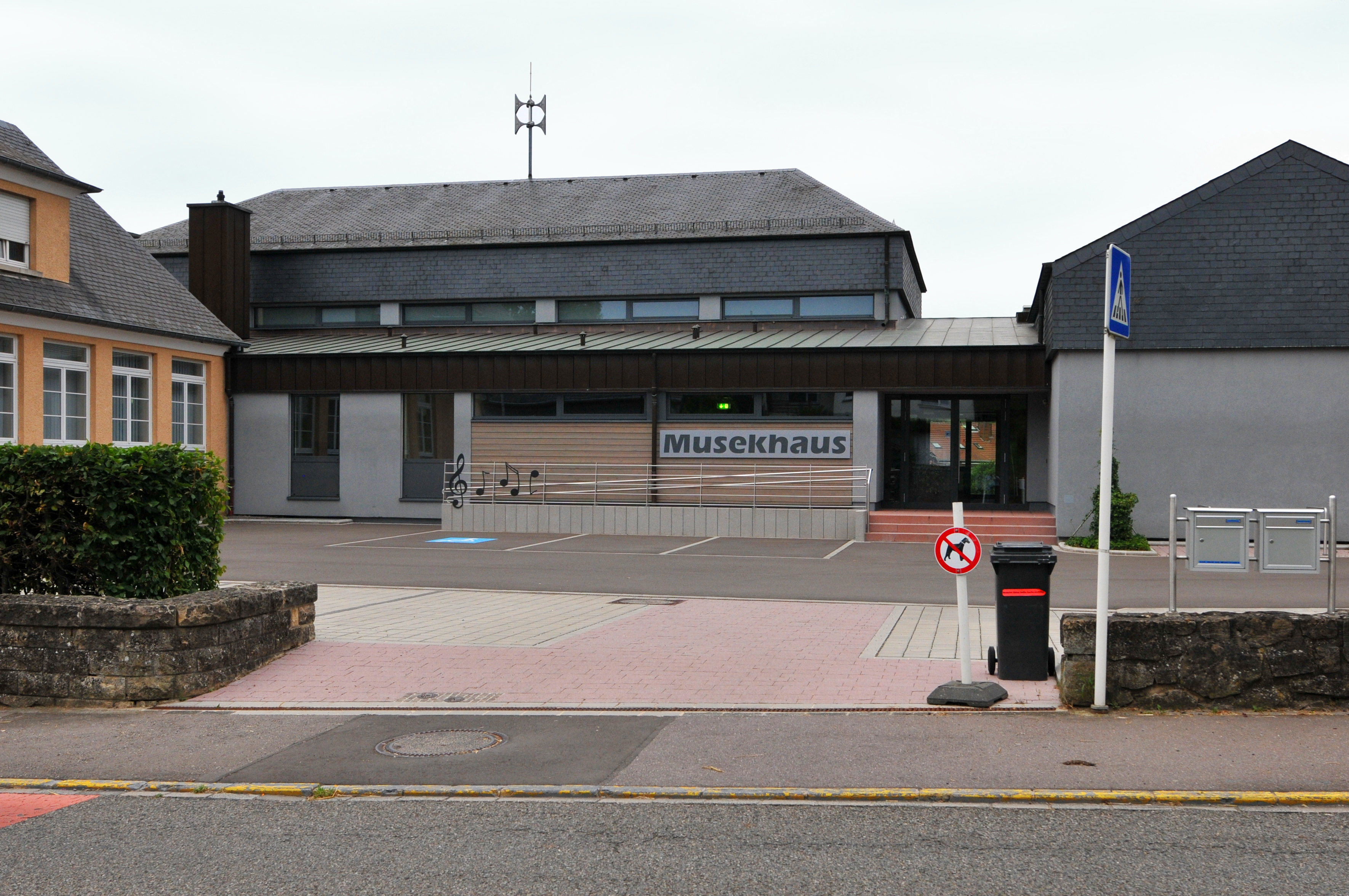 D'Musekhaus zu Éiter.